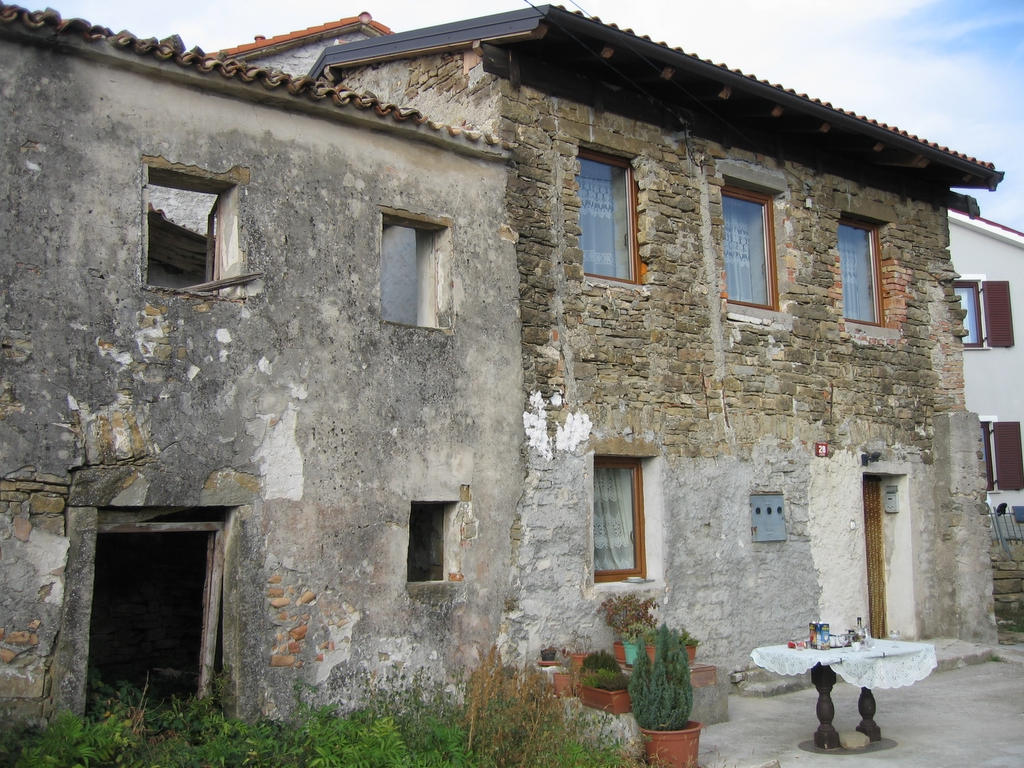 Točka Slovenske planinski poti v Tinjanu